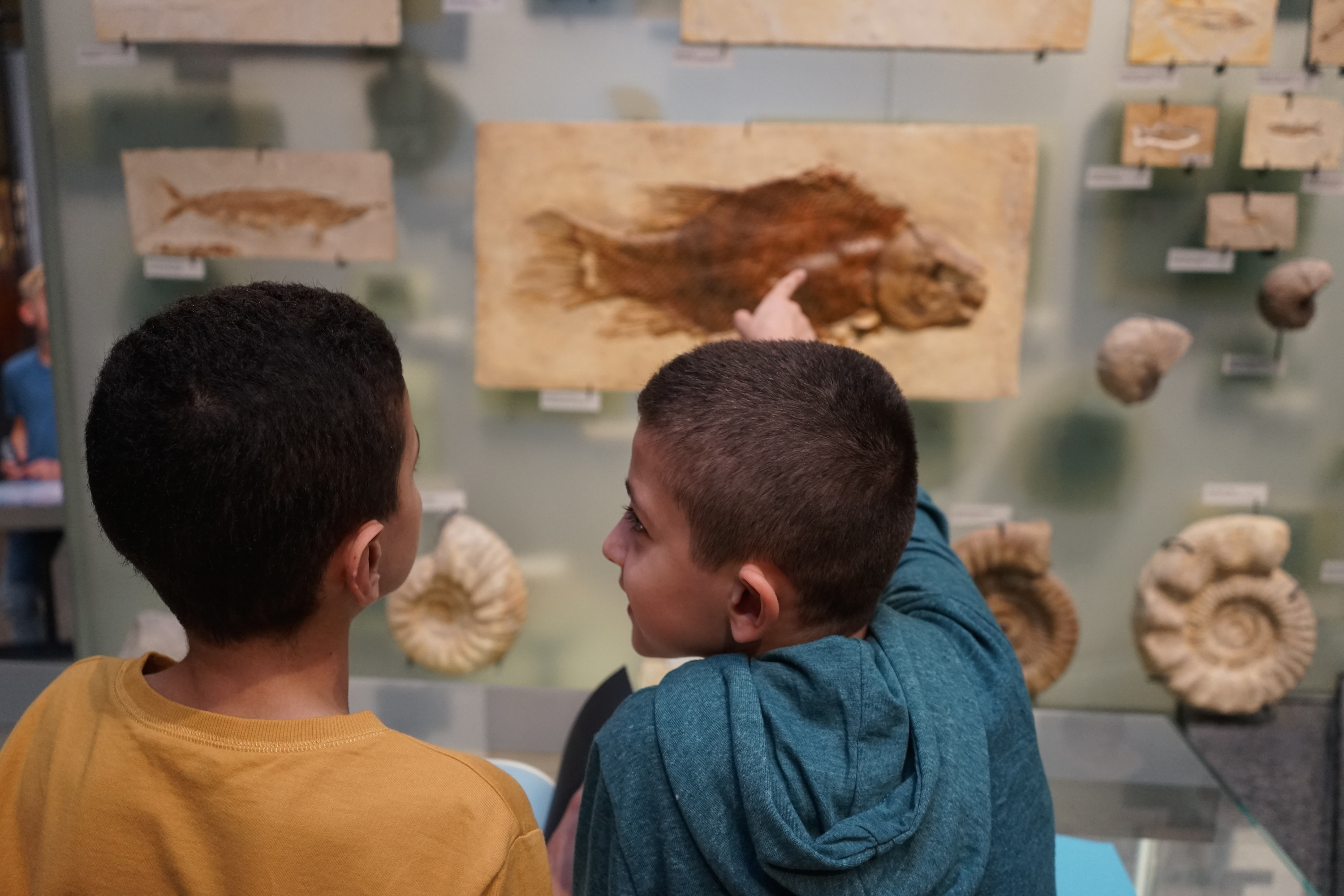 Staunende Kinder im Naturkundemuseum